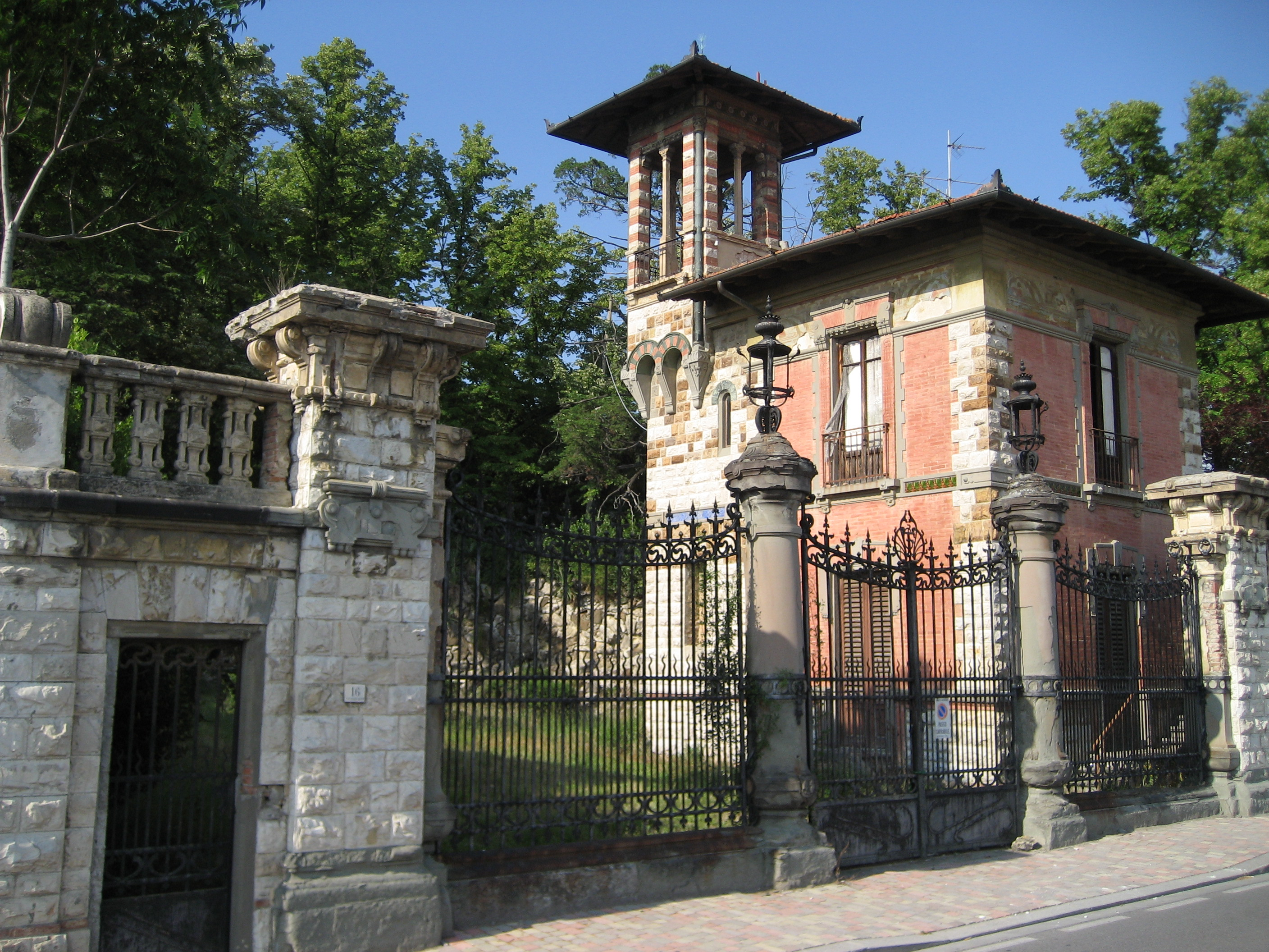 villino